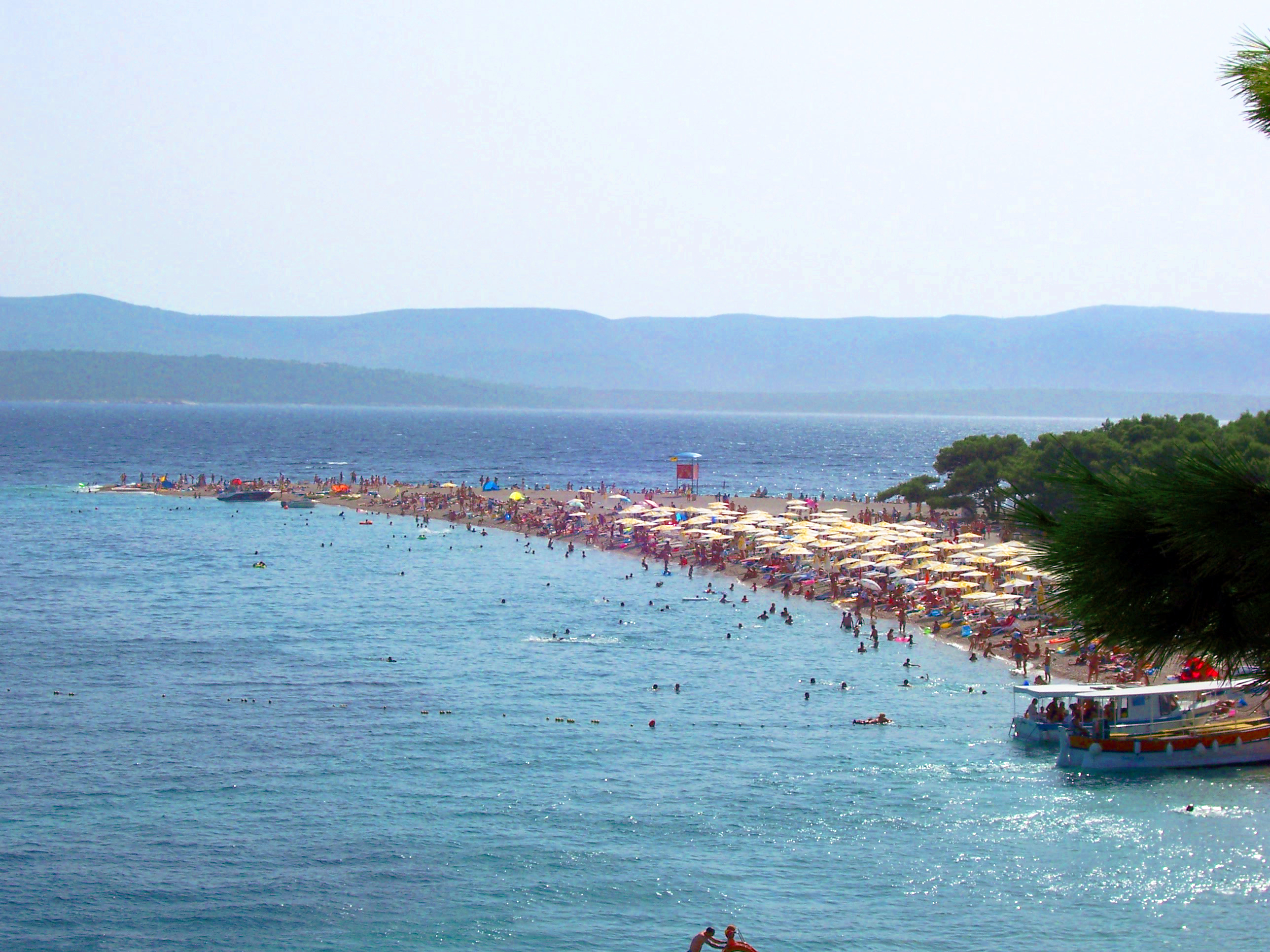 Playa de Bol